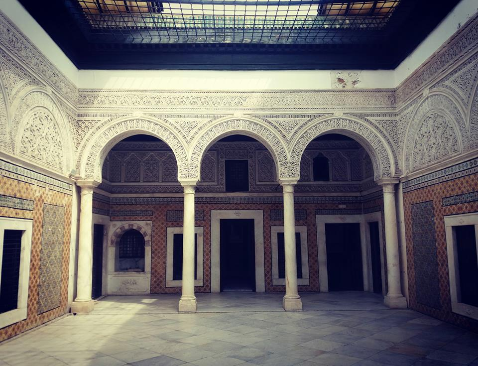 Dar Lasram